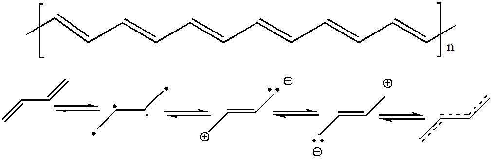 Delocalizacion de electrones en polímeros semiconductores